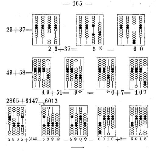 Азбука Л. Н. Толстого, 1872, стр 162